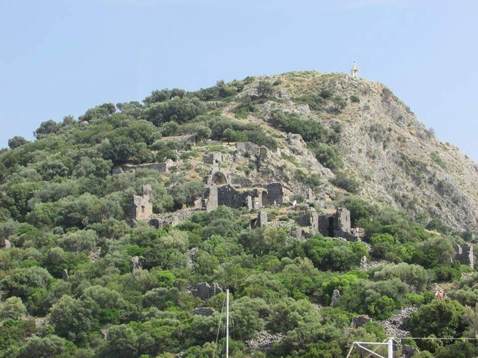 Gemiler Adasındaki kalıntılardan bir görünüm.